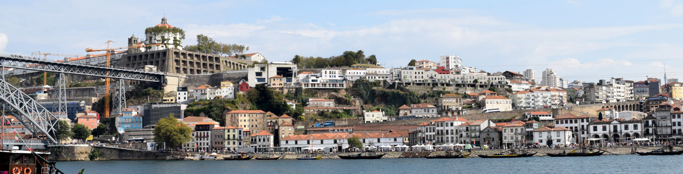 Vila Nova de Gaia 063DSC_0212